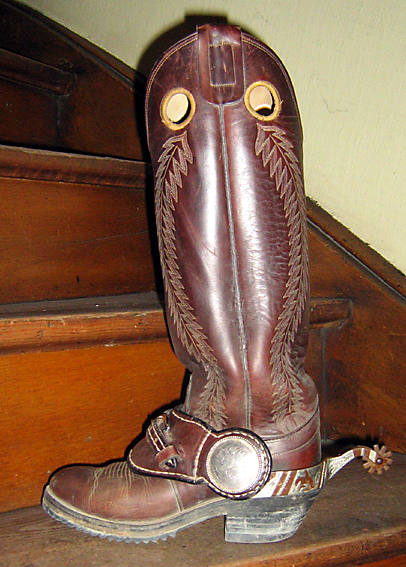 Buckaroo-Stiefel mit montiertem Sporn